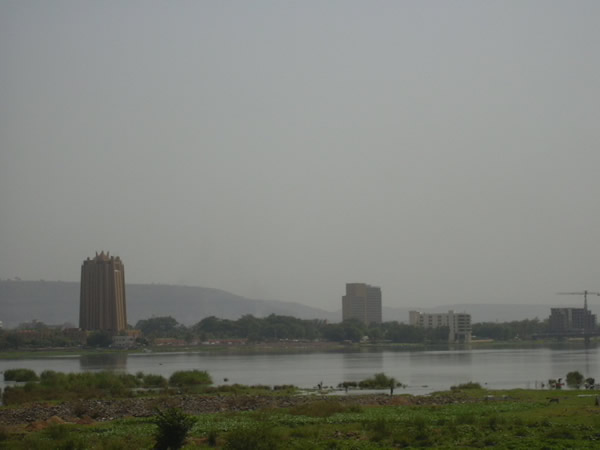 Photo de Bamako (avec le fleuve Niger)